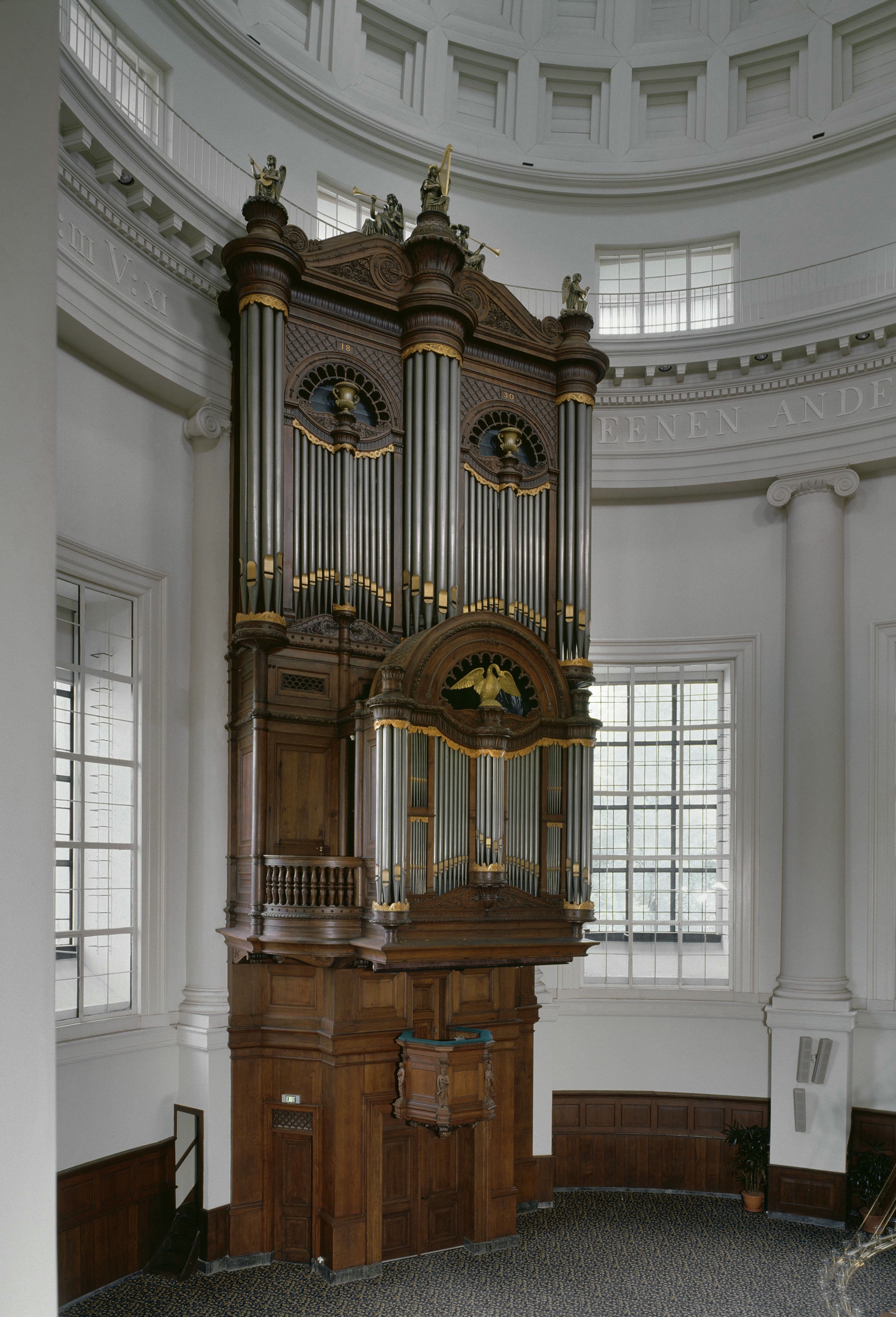 Nieuwe kerk of Ronde Lutherse kerk: Interieur, aanzicht orgel (opmerking: Gefotografeerd voor Het Historische Orgel in Nederland 1819-1840, bladzijde 232)